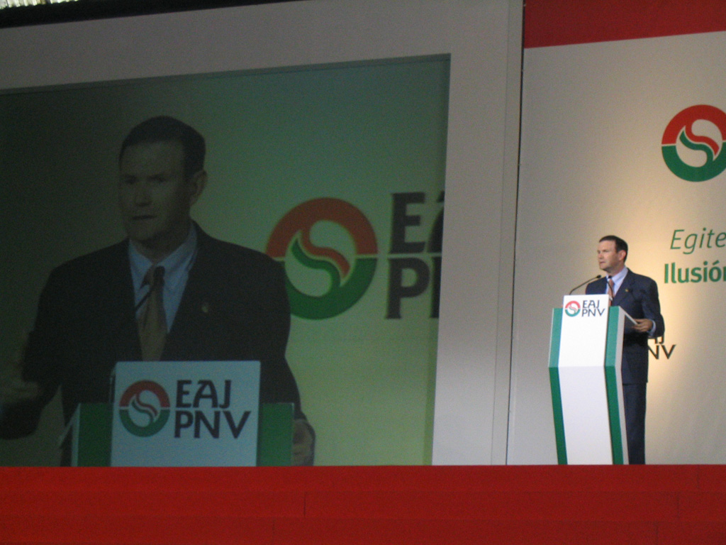 Ibarretxe Lehendakaria Bilbon 2003ko Aberri Egunean (Berpizkunde Domekan 2003)